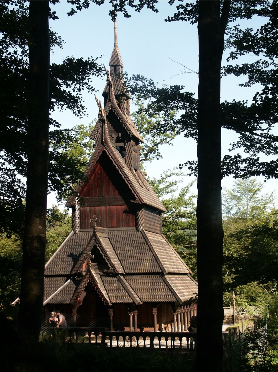 Fantoft Stave Church, Bergen